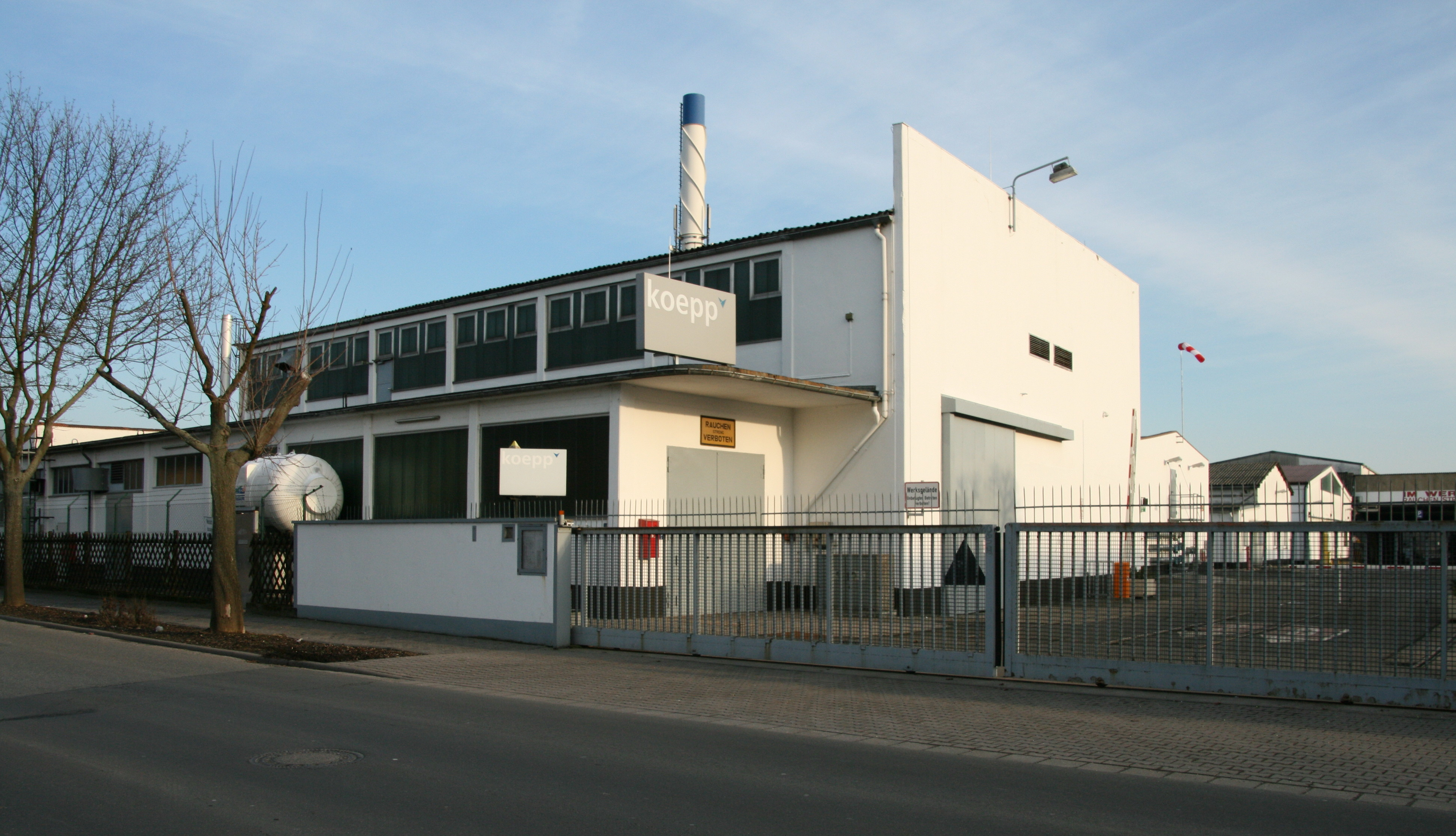 Werksgebäude der Koepp Schaum GmbH in Oestrich im Rheingau, Hessen.